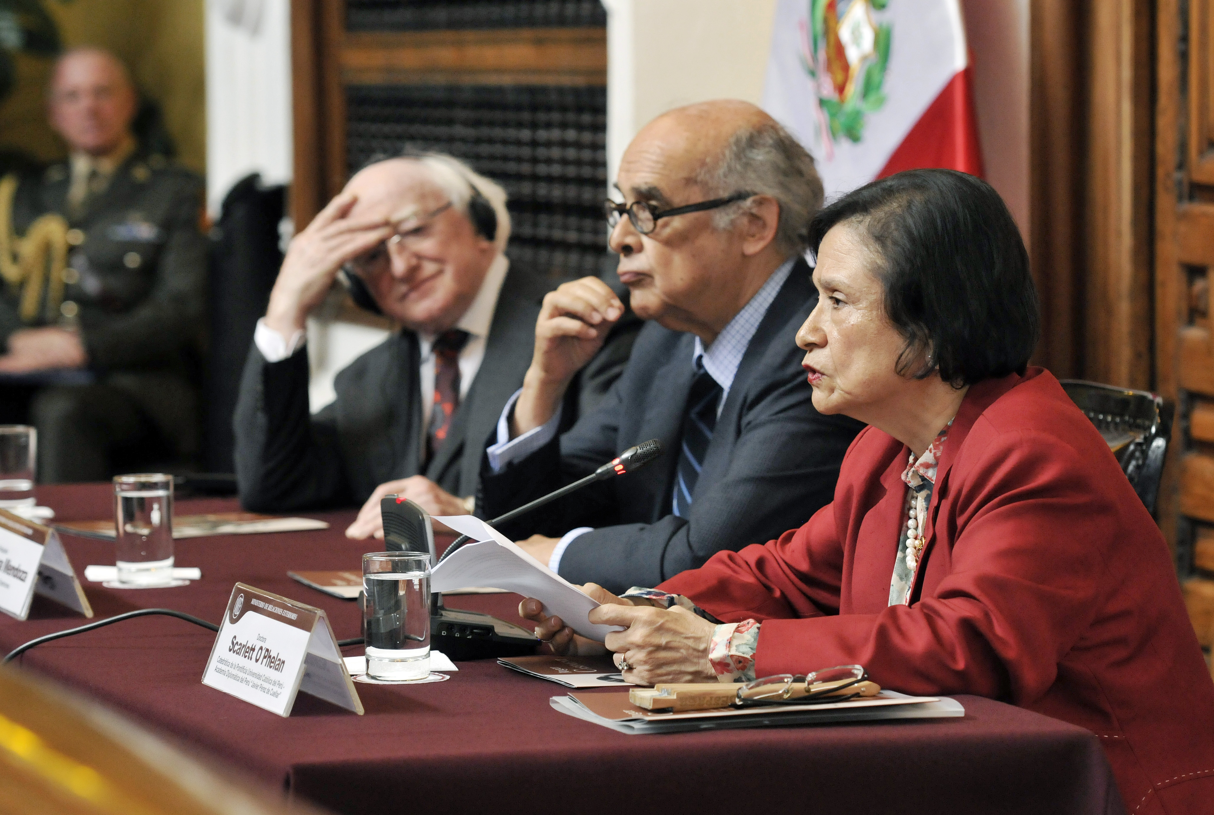 En la sede del Palacio de Torre Tagle, el Presidente de Irlanda brindó la conferencia “Una mirada ineludible: el legado de Roger Casement para la humanidad en su visión humanitaria y universal”. El evento estuvo encabezado por el Canciller, Embajador Ricardo Luna, quien presentó al dignatario irlandés. Asimismo, la Dra. Scarlett O’Phelan realizó una introducción sobre el tema.